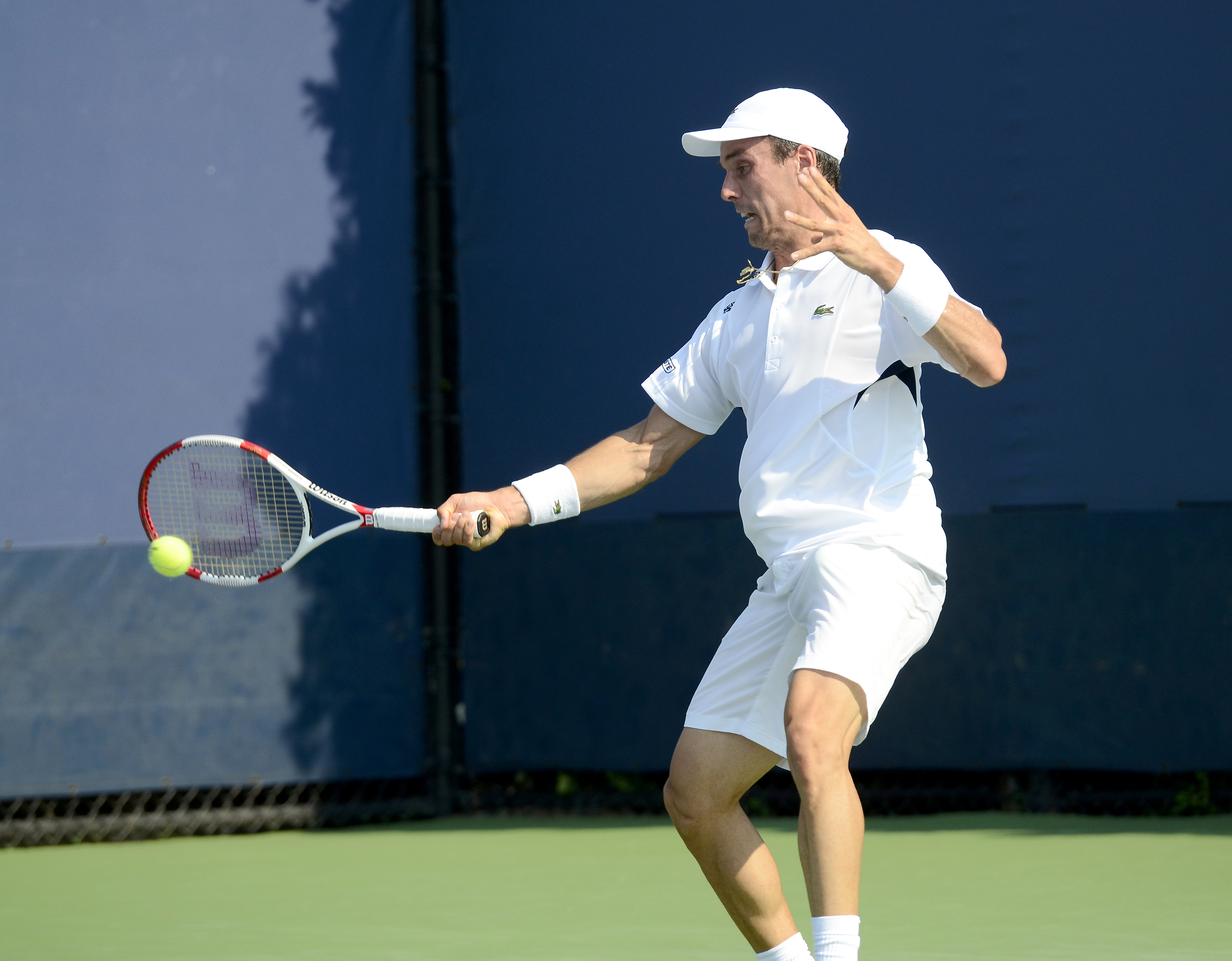 August 26, 2014 Queens, NY Roberto Bautista Agut (ESP) def. Andreas Haider-Maurer (AUT)